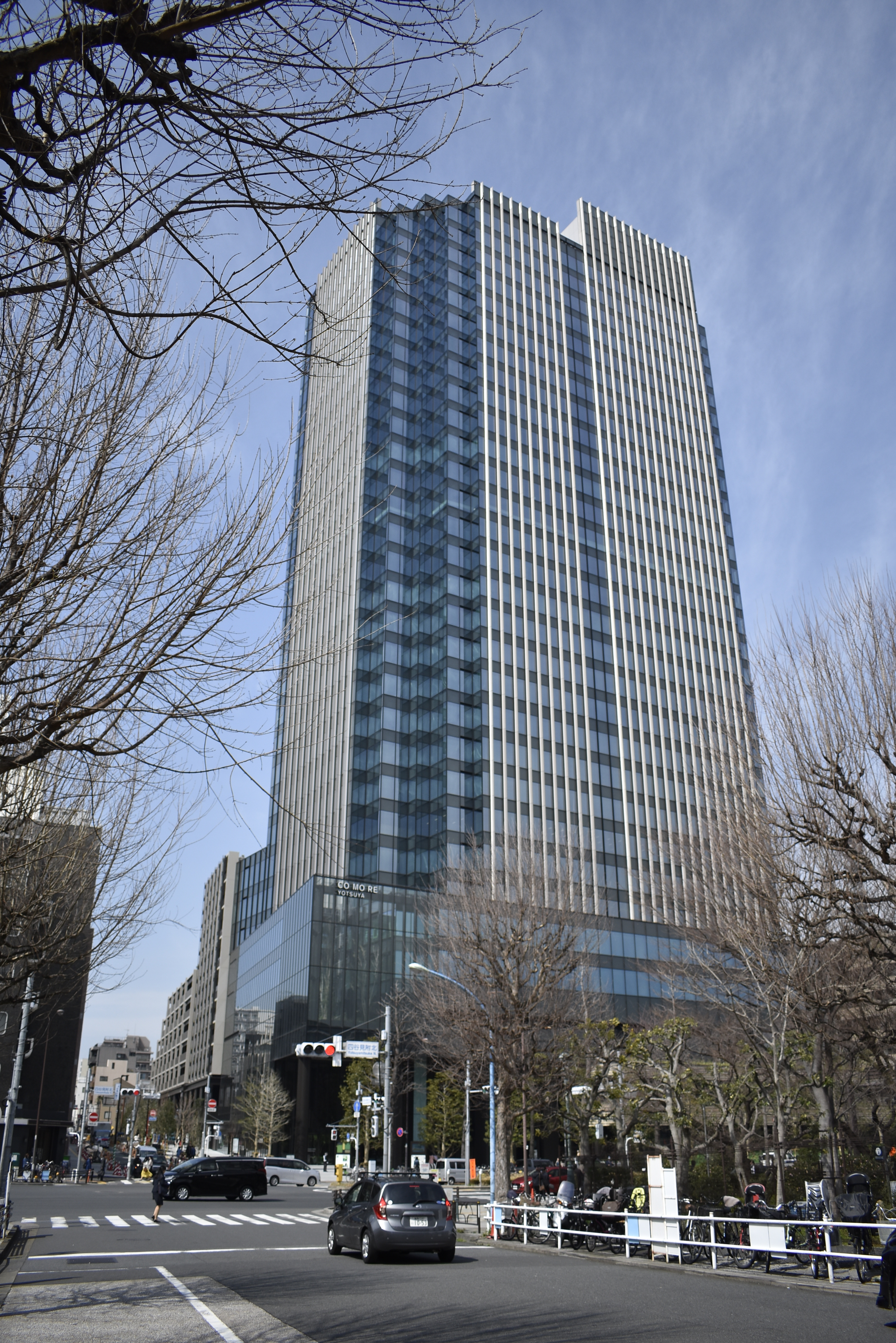 CO･MO･RE YOTSUYA